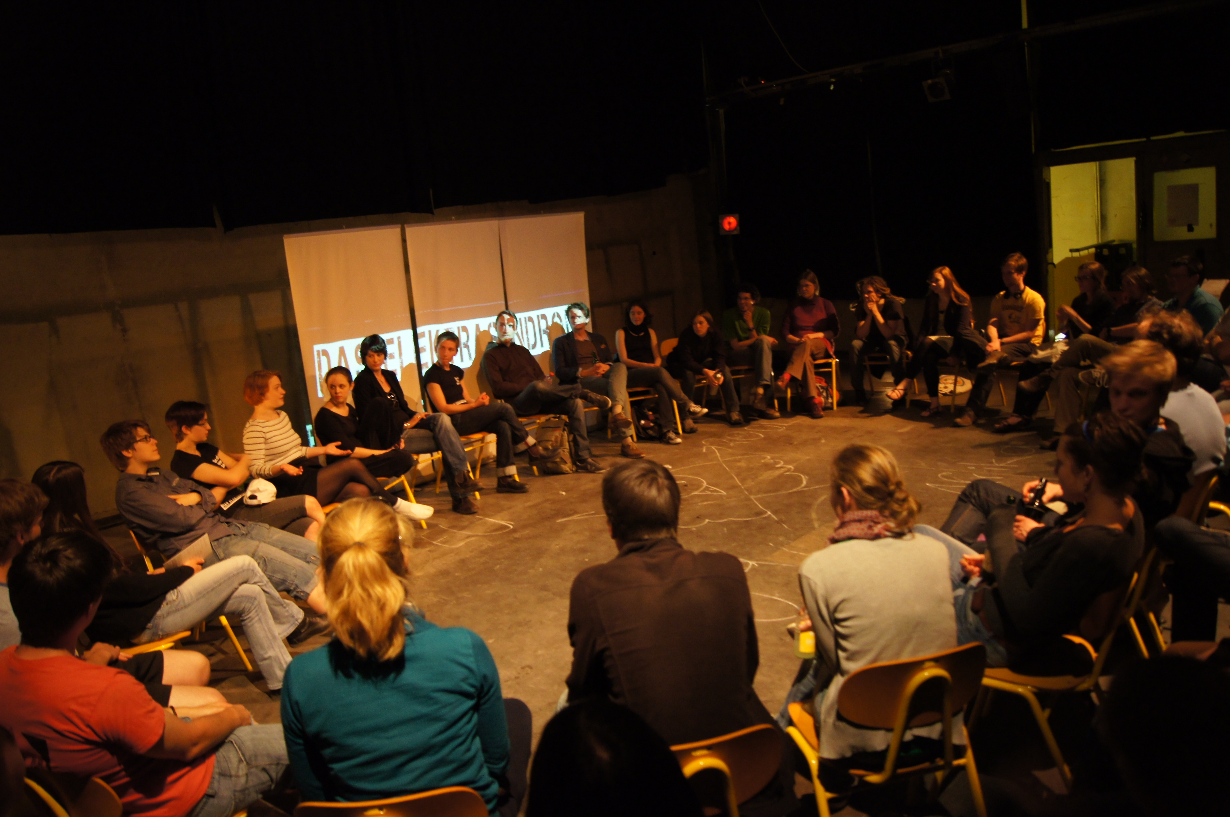 Verpflegung der Teilnehmen durch die Volxküche des Wirkcamps Synagieren